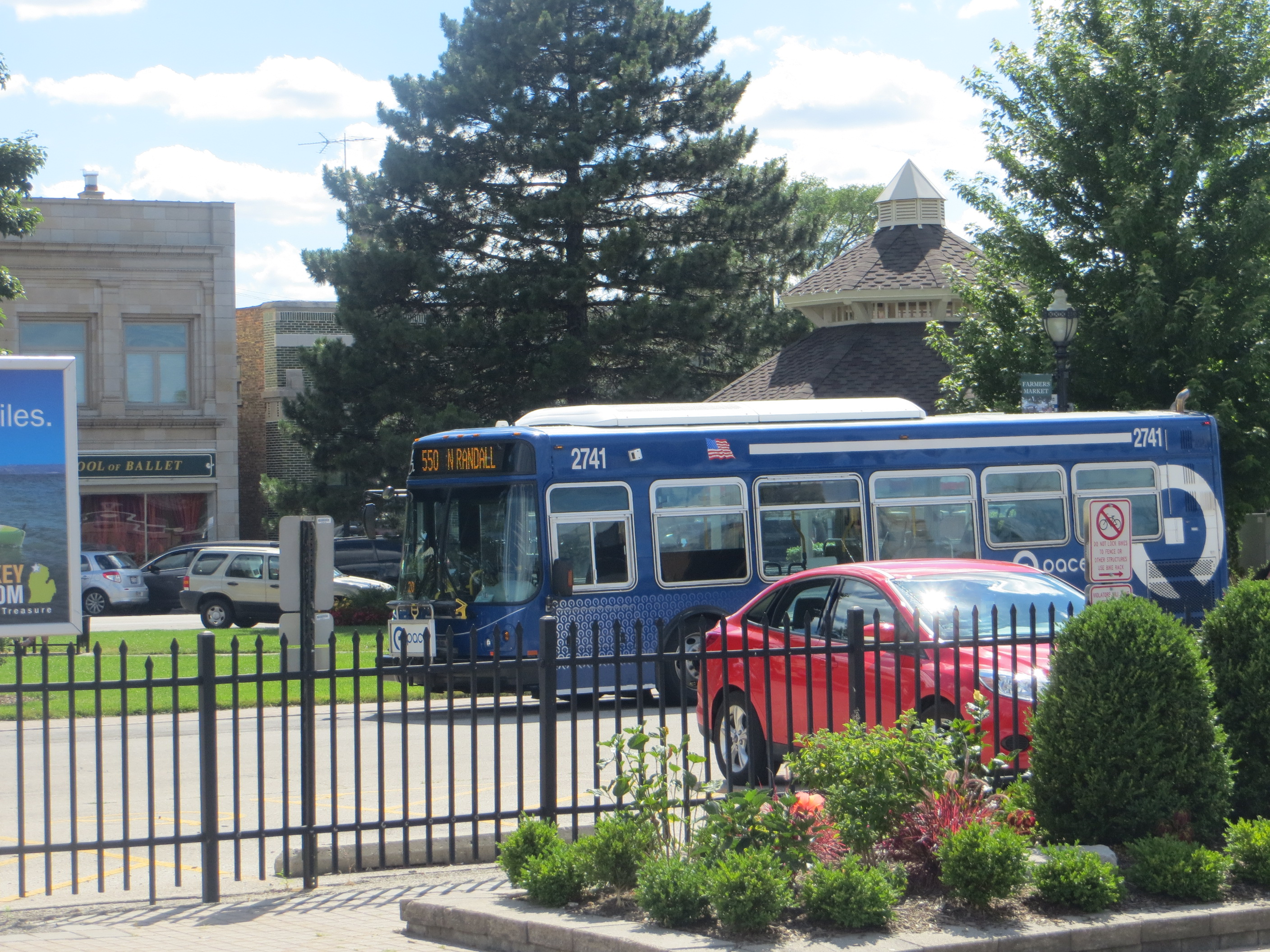 20160701 27 Pace bus, Crystal Lake, Illinois